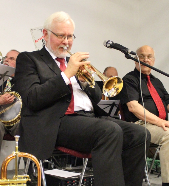 Johannes K. Rücker & die Pickled Onions Jazzband am 30.4.2012 in der Katholischen Landvolkshochschule Freckenhorst